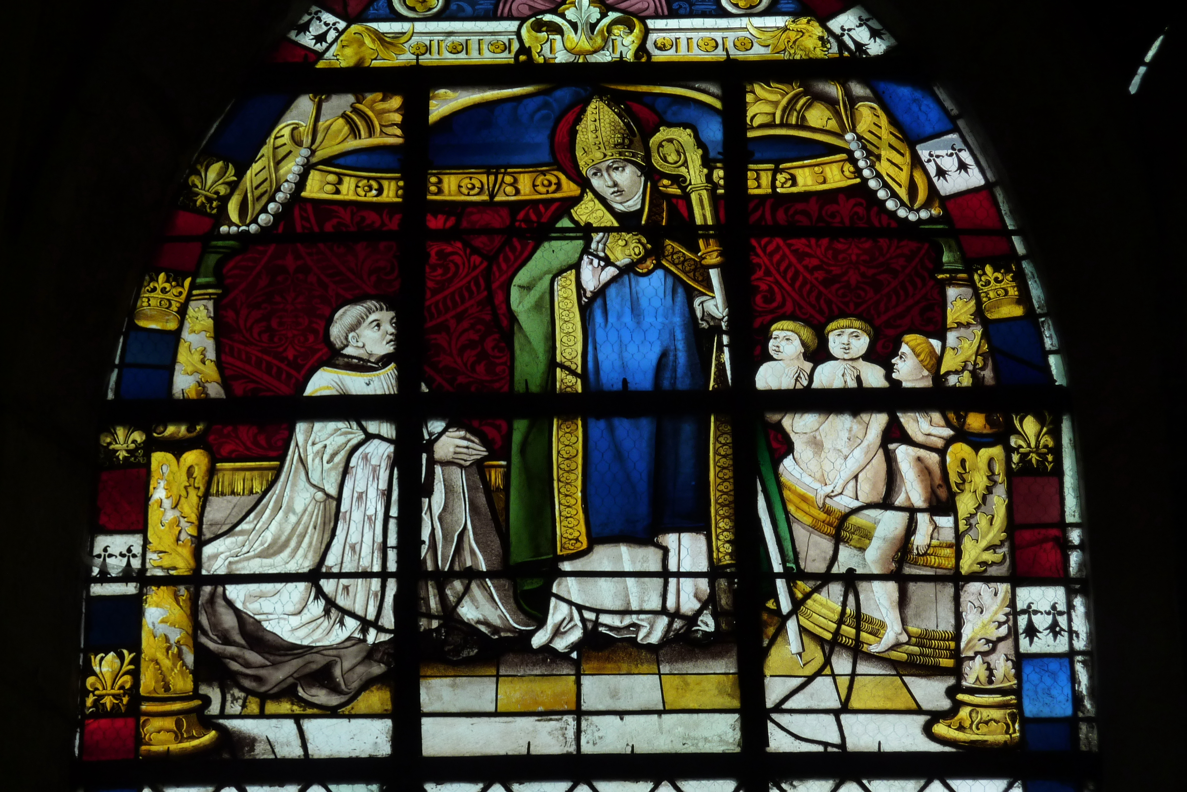 Ehemalige Kollegiatskirche Saint-Martin in Champeaux (Seine-et-Marne) im Département Seine-et-Marne in der Region Île-de-France (Frankreich), Bleiglasfenster aus dem 16. Jahrhundert, Darstellung: hl. Nikolaus und Scholaren im Salzfass (Ausschnitt). Fenster n° 8 nach der Numerierung von G. Leroy, 1896 (siehe Plan).